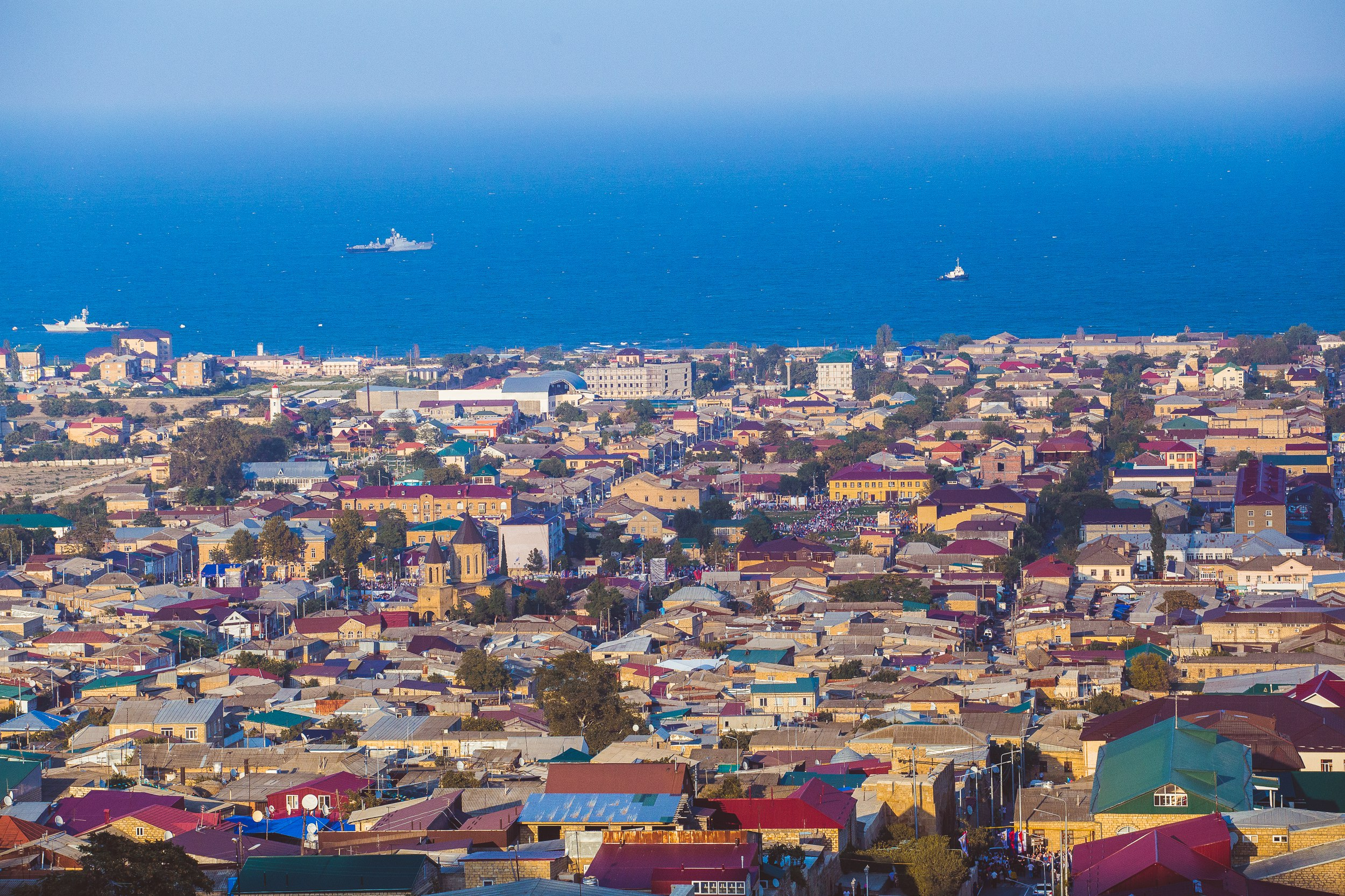 Дагестанский город Дербент в день празднования 2000 летия